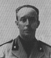 Aviatore italiano